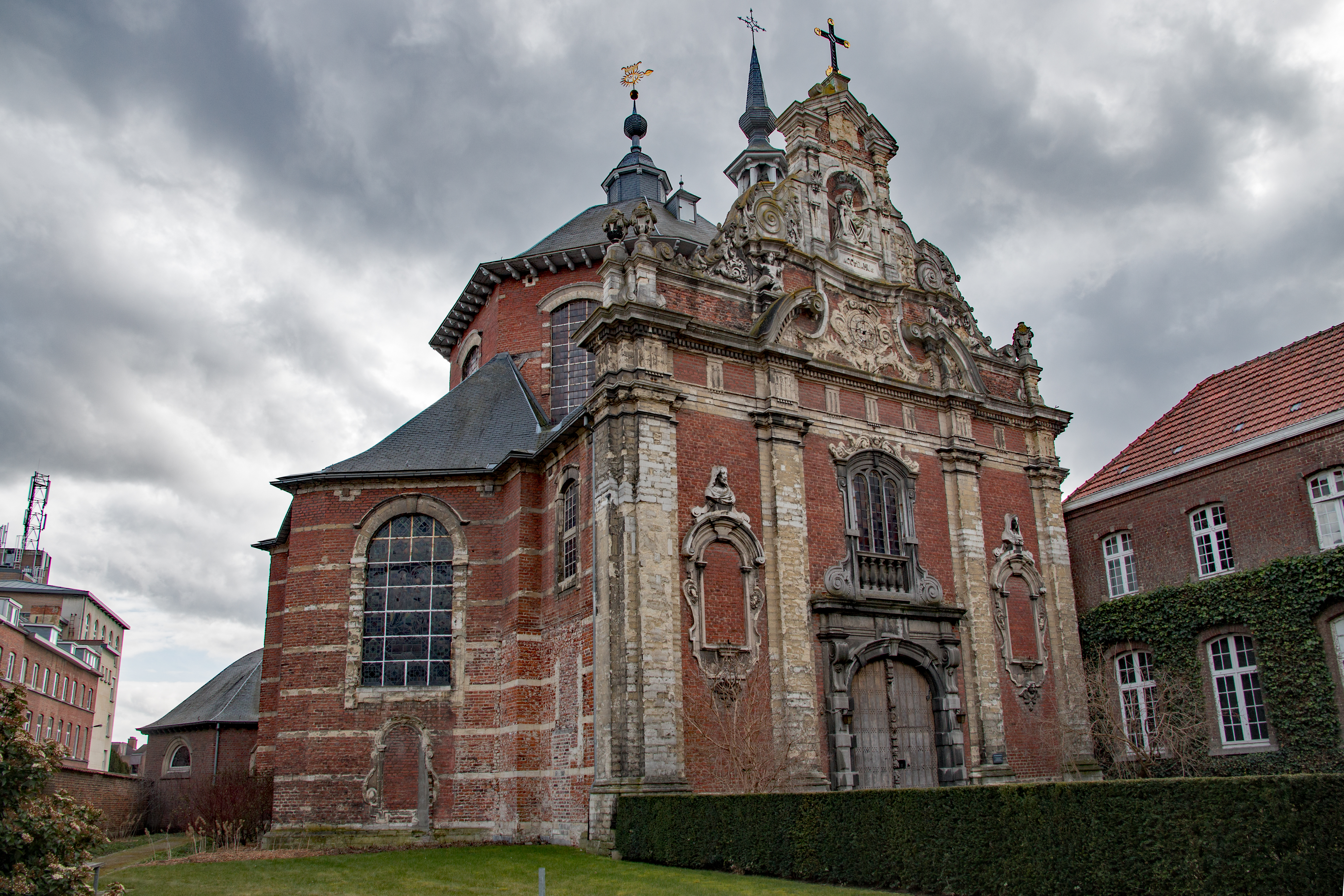 Kapel van Onze-Lieve-Vrouw-ter-Koorts in Leuven This photo of immovable heritage has been taken in the Flemish Region